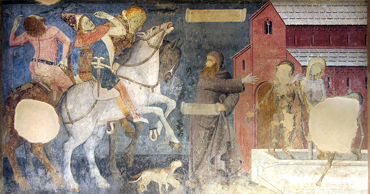 Albugnano (AT), chiesa (detta "abbazia") di S. Maria di Vezzolano, chiostro, affresco con il "contrasto dei tre morti e dei tre vivi", attribuito alla seconda metà del XIV secolo.